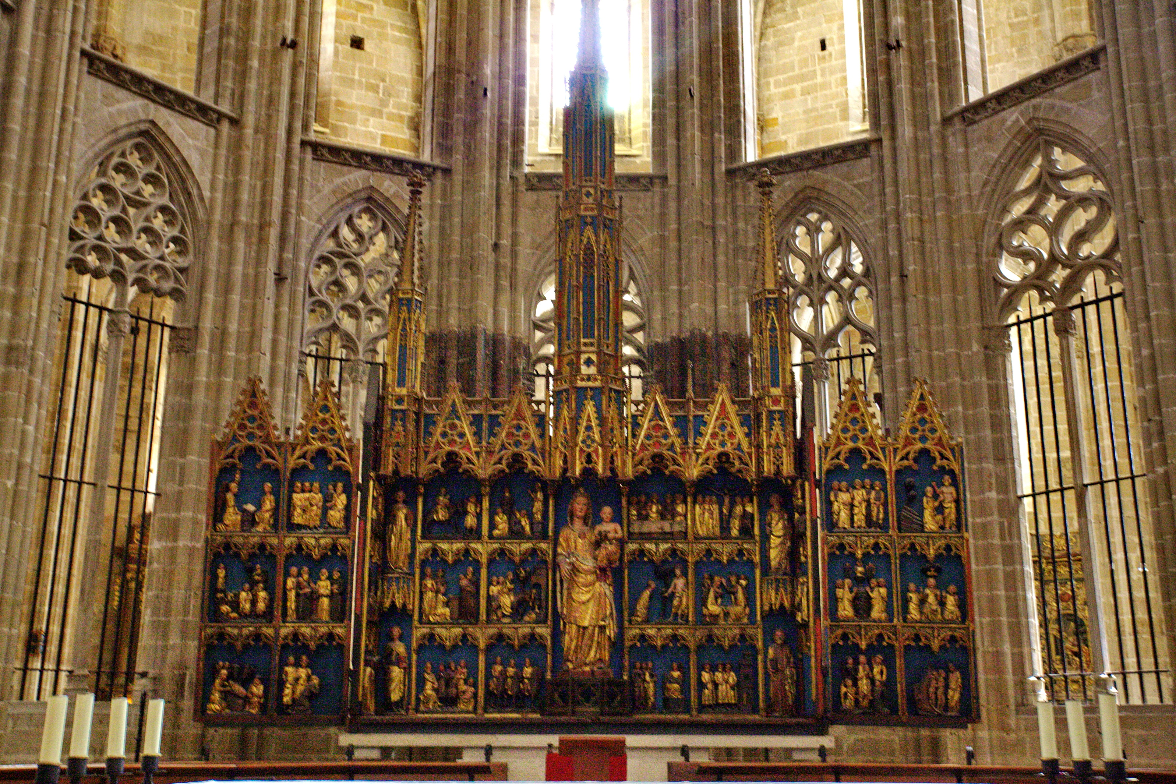 “Retaule de la Verge de l'Estrella”, un políptic d'autor desconegut. És l'altar major de la catedral de Tortosa.